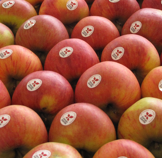 Stick marque Savoie - Pommes